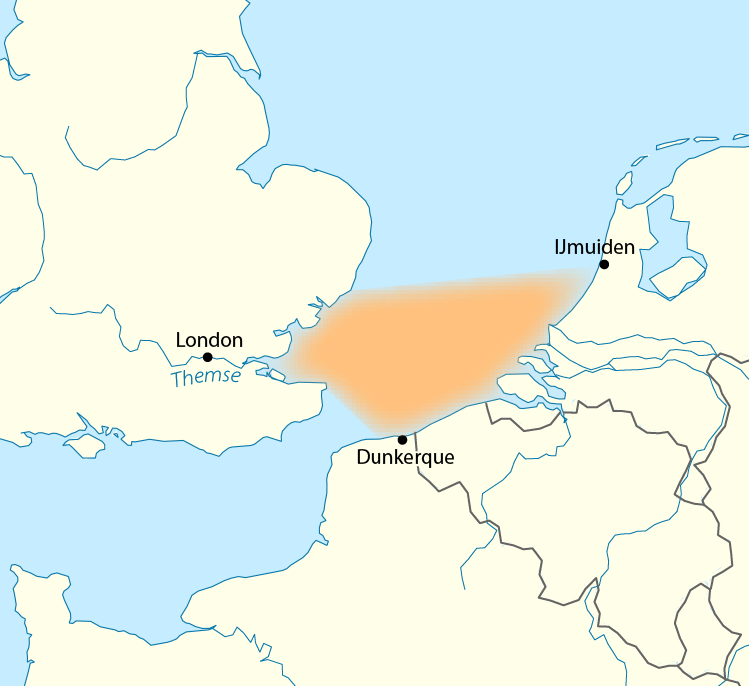 Karte: Operationsgebiet der Seehund-U-Boote